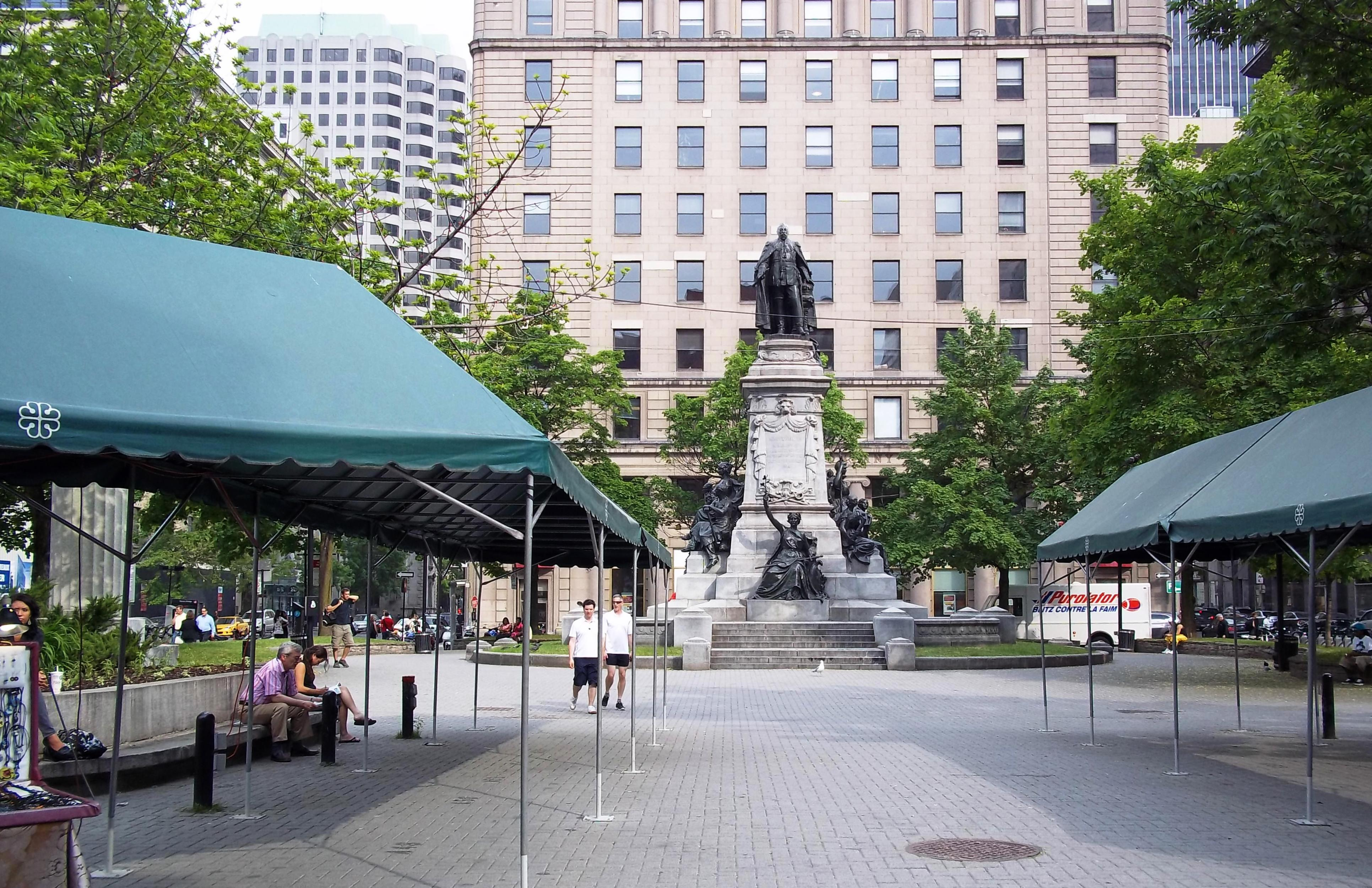 Monument à Édouard VII, square Phillips, Montréal